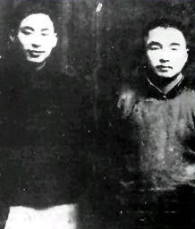 yeshengtao with zhuziqing